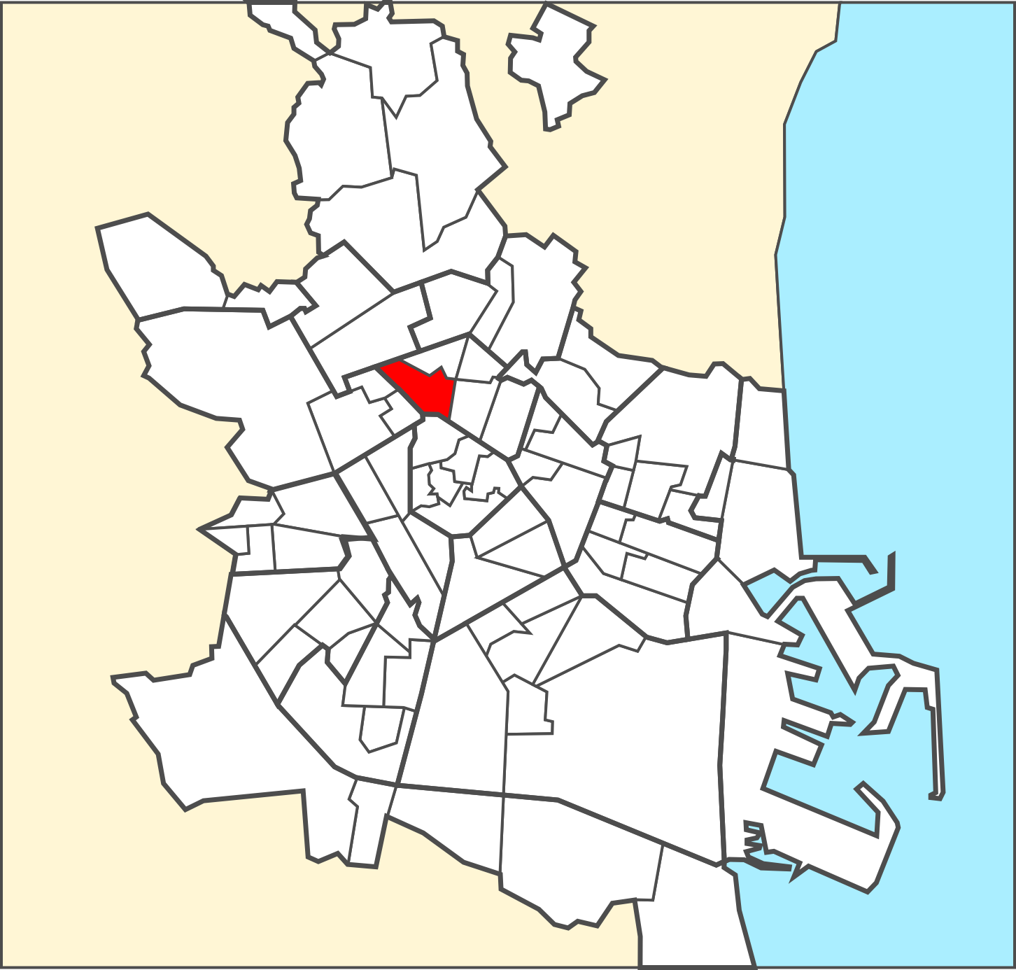 Localització del barri dins de la ciutat de València.